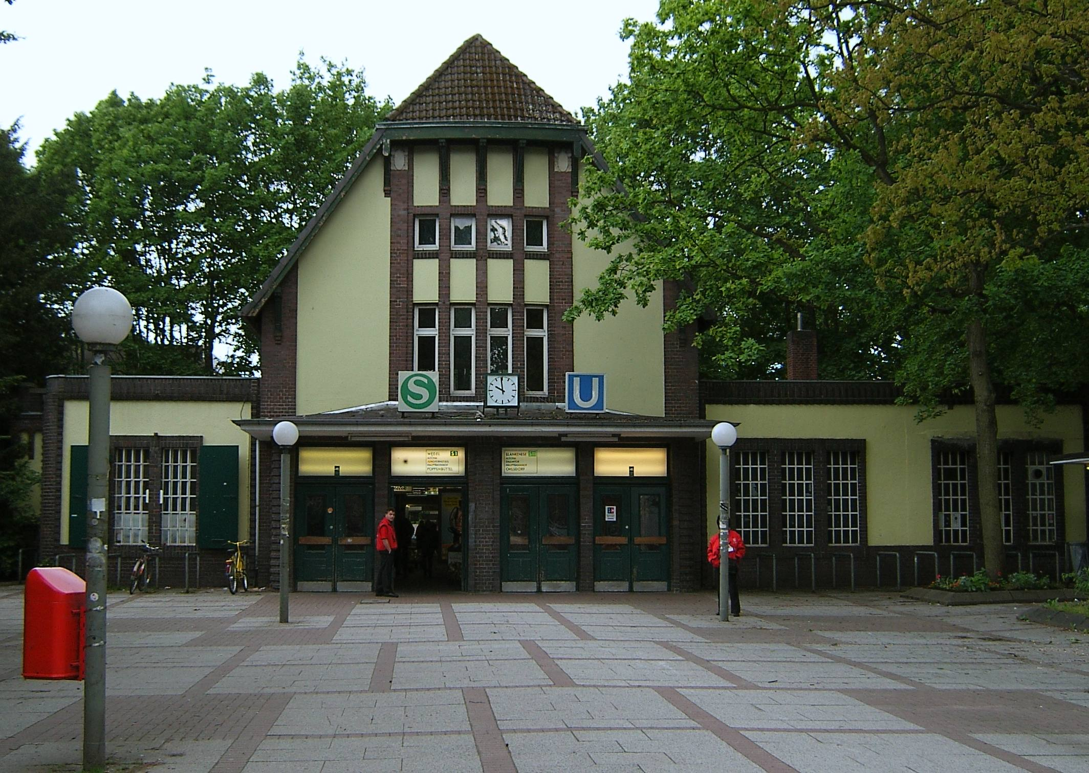 Bildbeschreibung: Hamburg, Ohlsdorf, Bahnhof Fotograf: selbst Datum: 28.5.2006